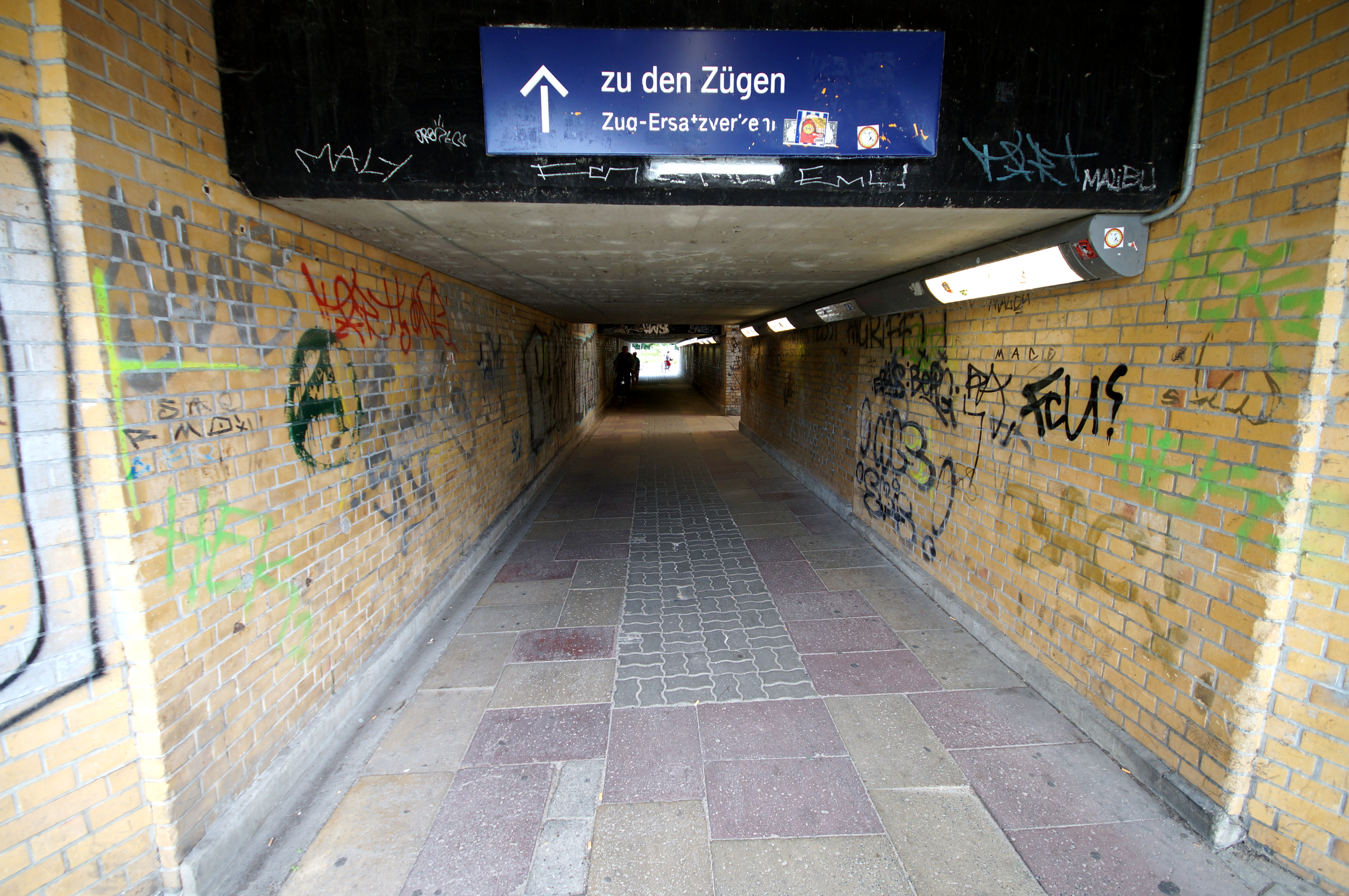 Die Unterführung unter den Bahnhof Königs Wusterhausen